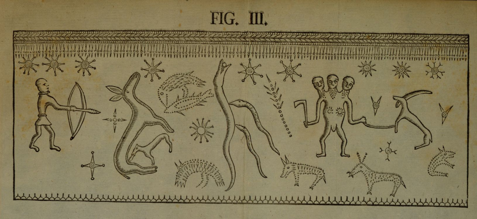 Affotografering af Paullis tegning af det korte horn (fig. III).